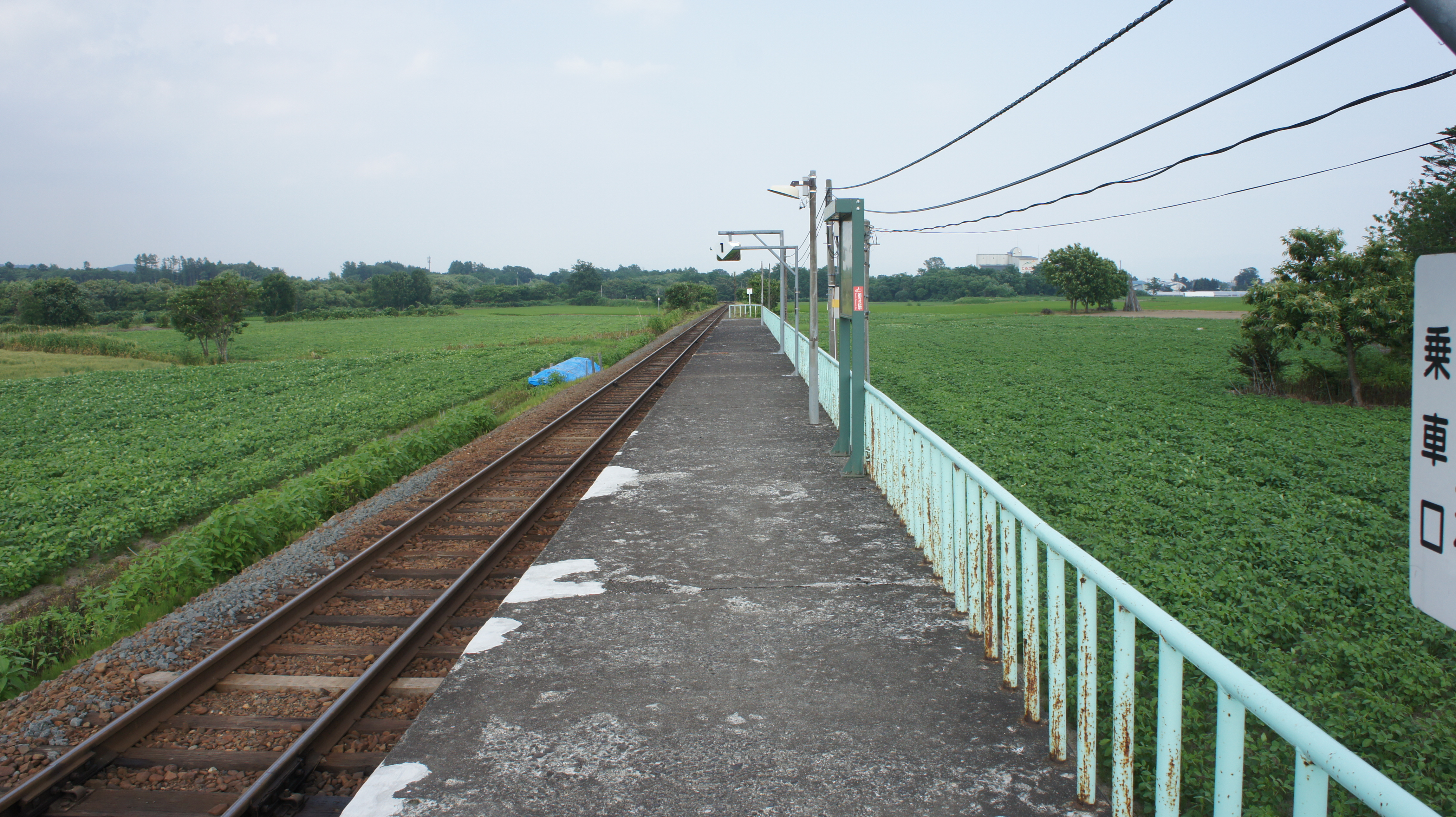 JR札沼線・知来乙駅のホーム Sony NEX-3